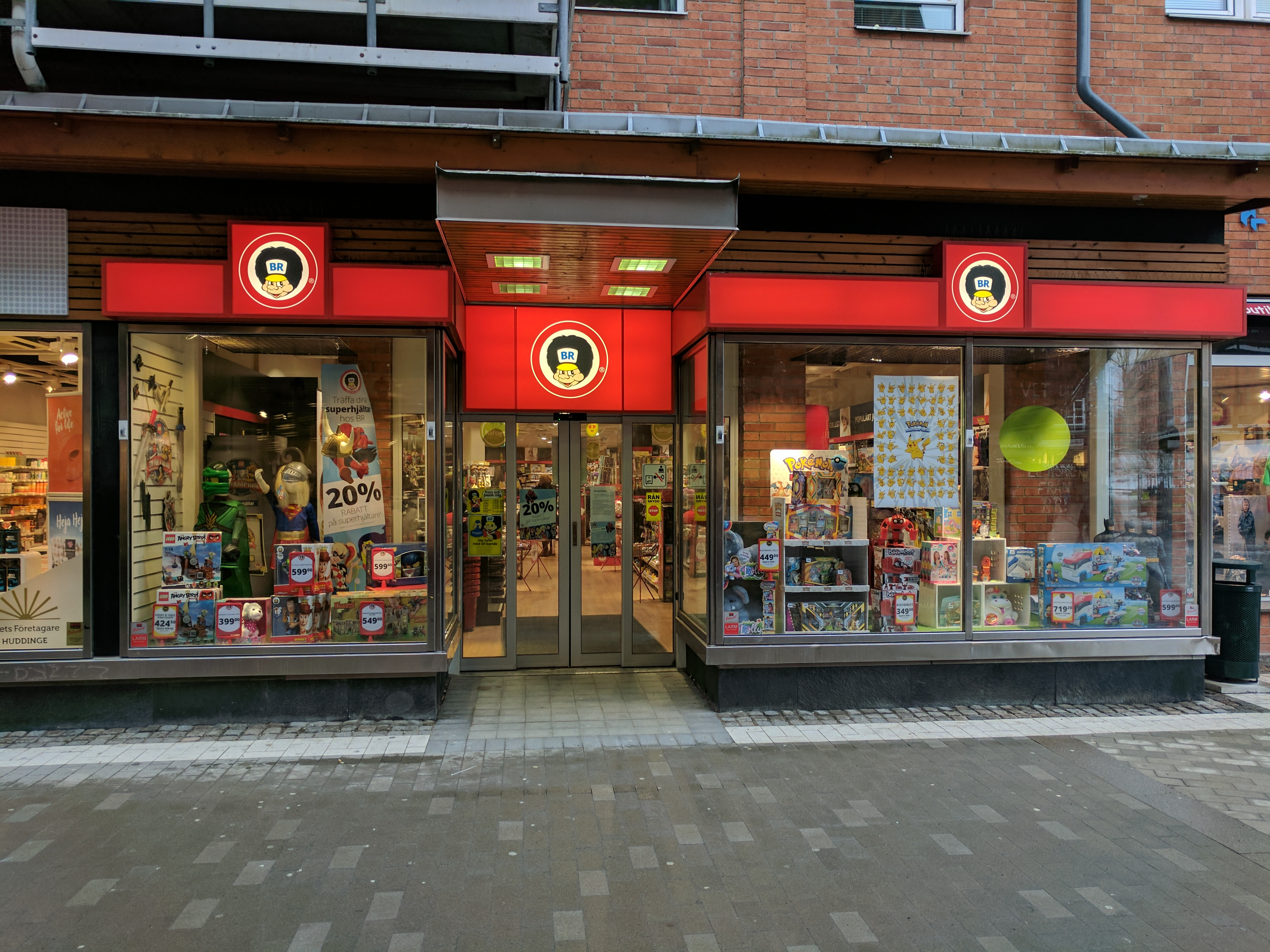 BR-Leksaker i Huddinge